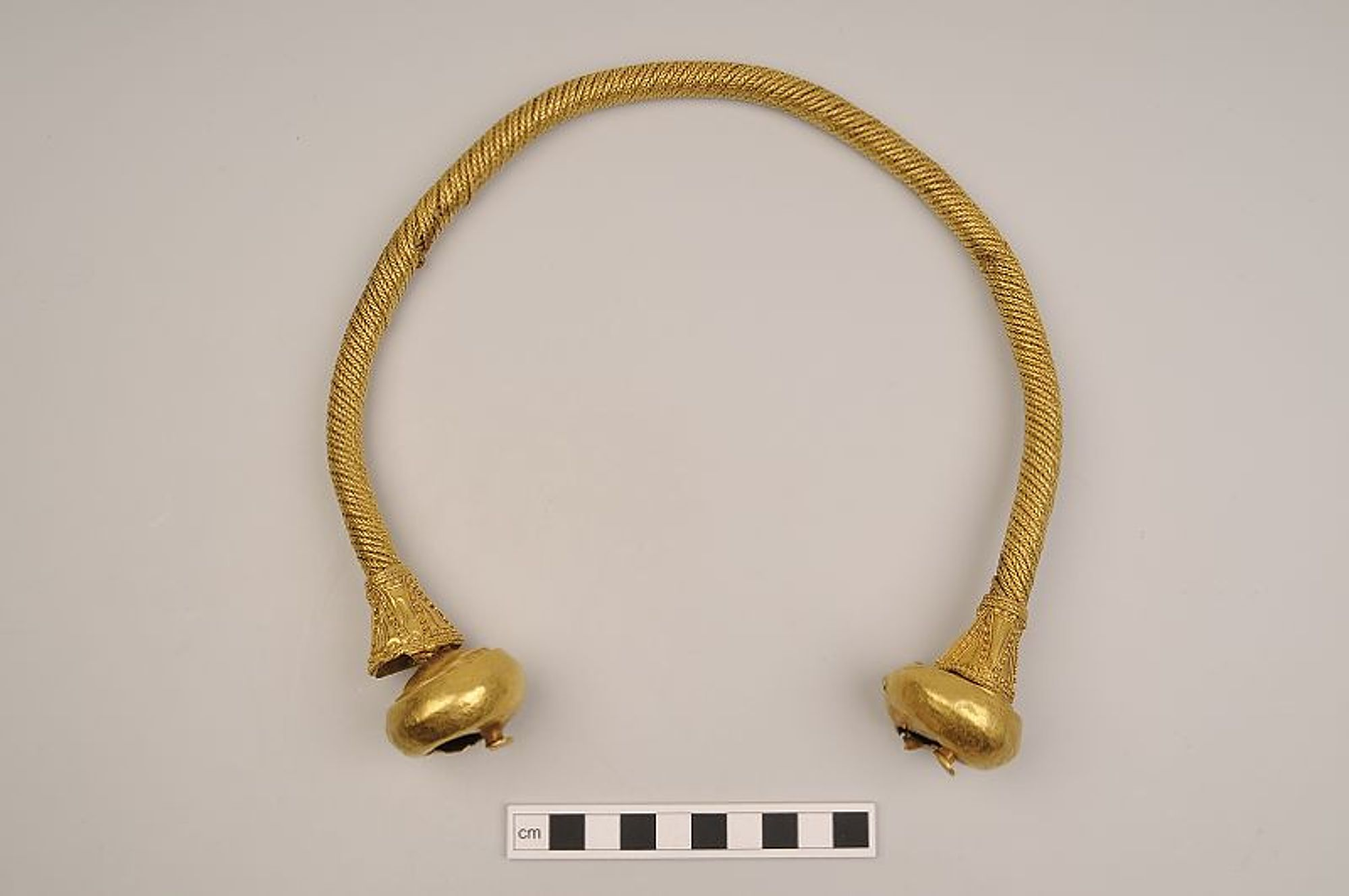 Torquesring ur den så kallade Vitteneskatten. Statens historiska museum, inventarienummer 32698.